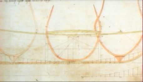 Dessin coté d'un vaisseau de Matthew Baker